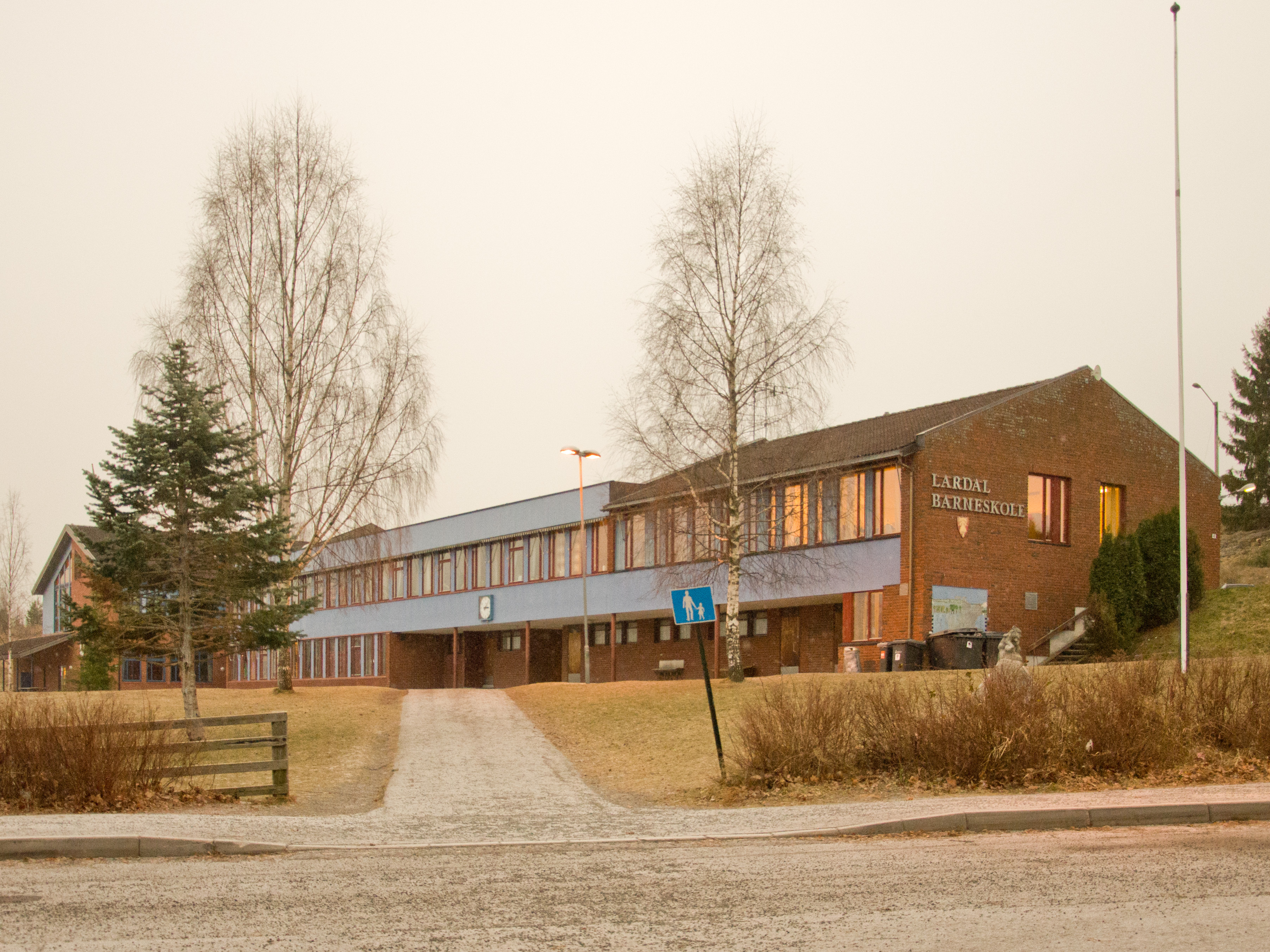 Lardal barneskole i Svarstad, Lardal, Vestfold